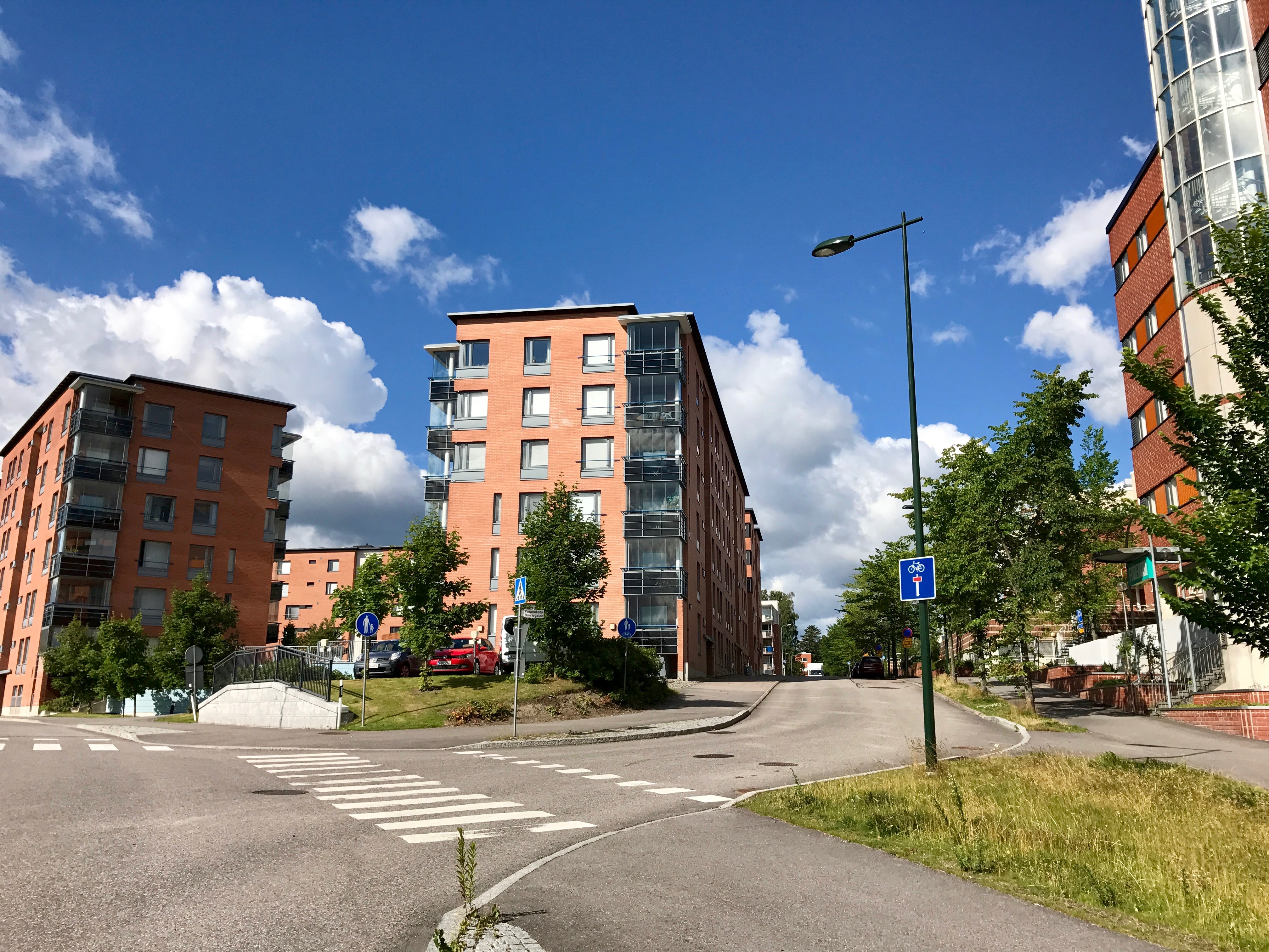 Näkymä Espoon Vallikalliosta